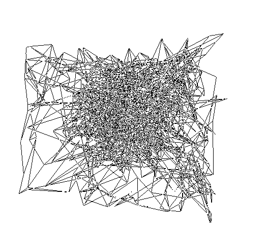 Som - nach 100 Schritten